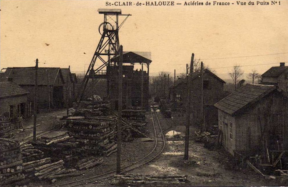 Mine de Saint-Clair-de-Halouze.